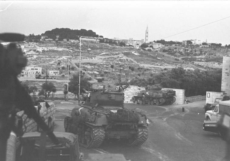 טנקי סופר שרמן של פלוגת הטנקים הסודית בירושלים במהלך מלחמת ששת הימים